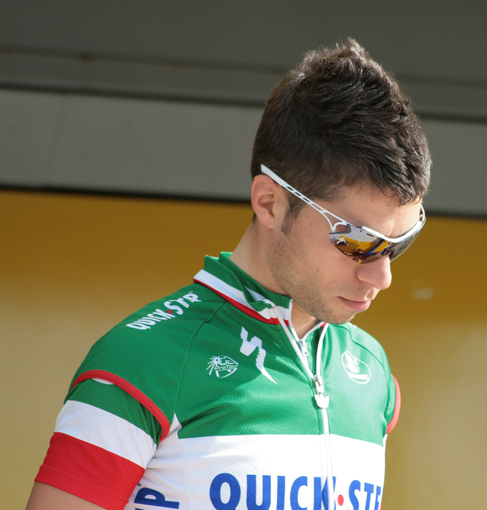 Giovanni Visconti voor de start van Luik-Bastenaken-Luik 2008